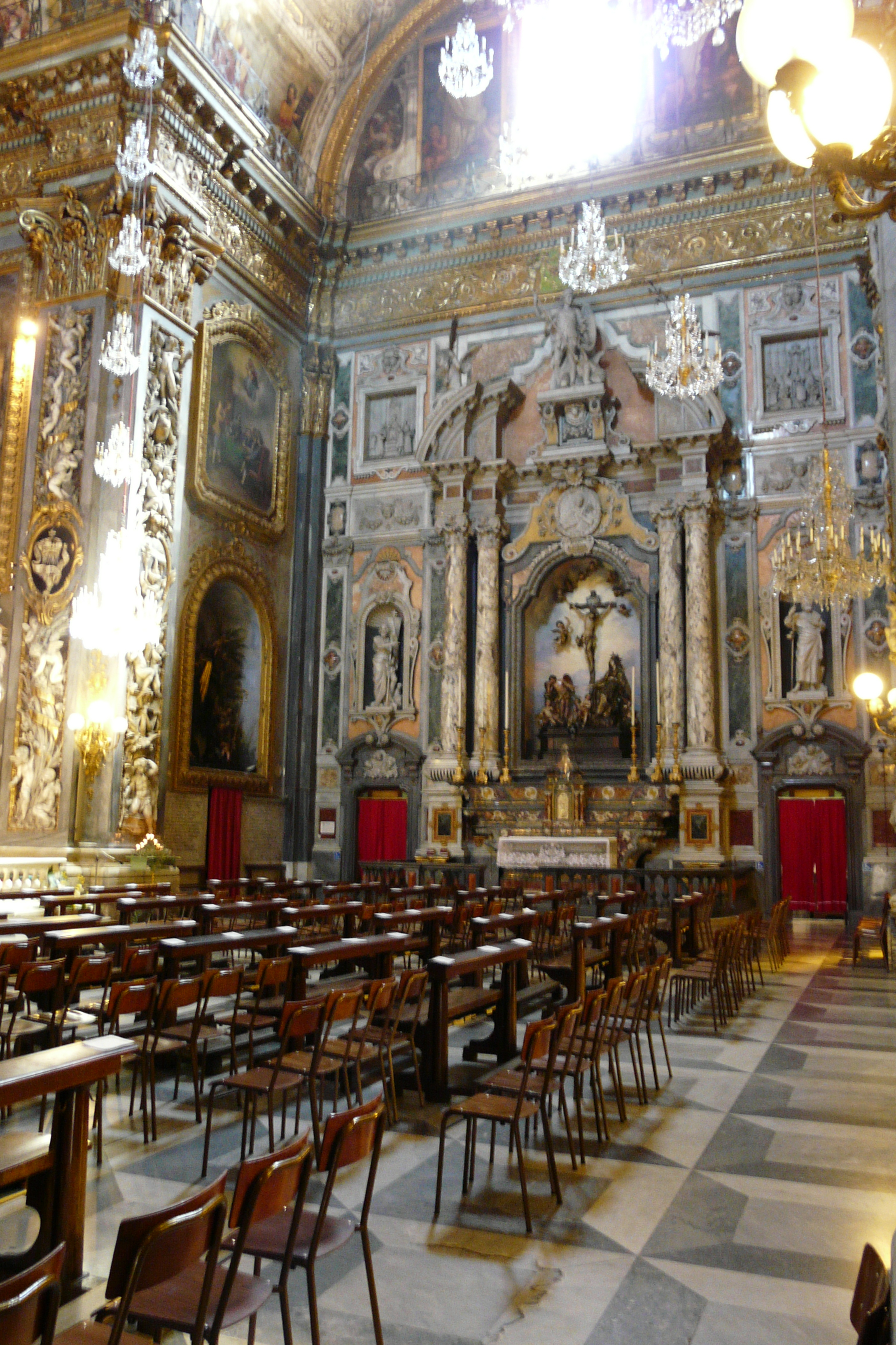 Interni della cattedrale di Nostra Signora dell'Orto di Chiavari, Liguria, Italia